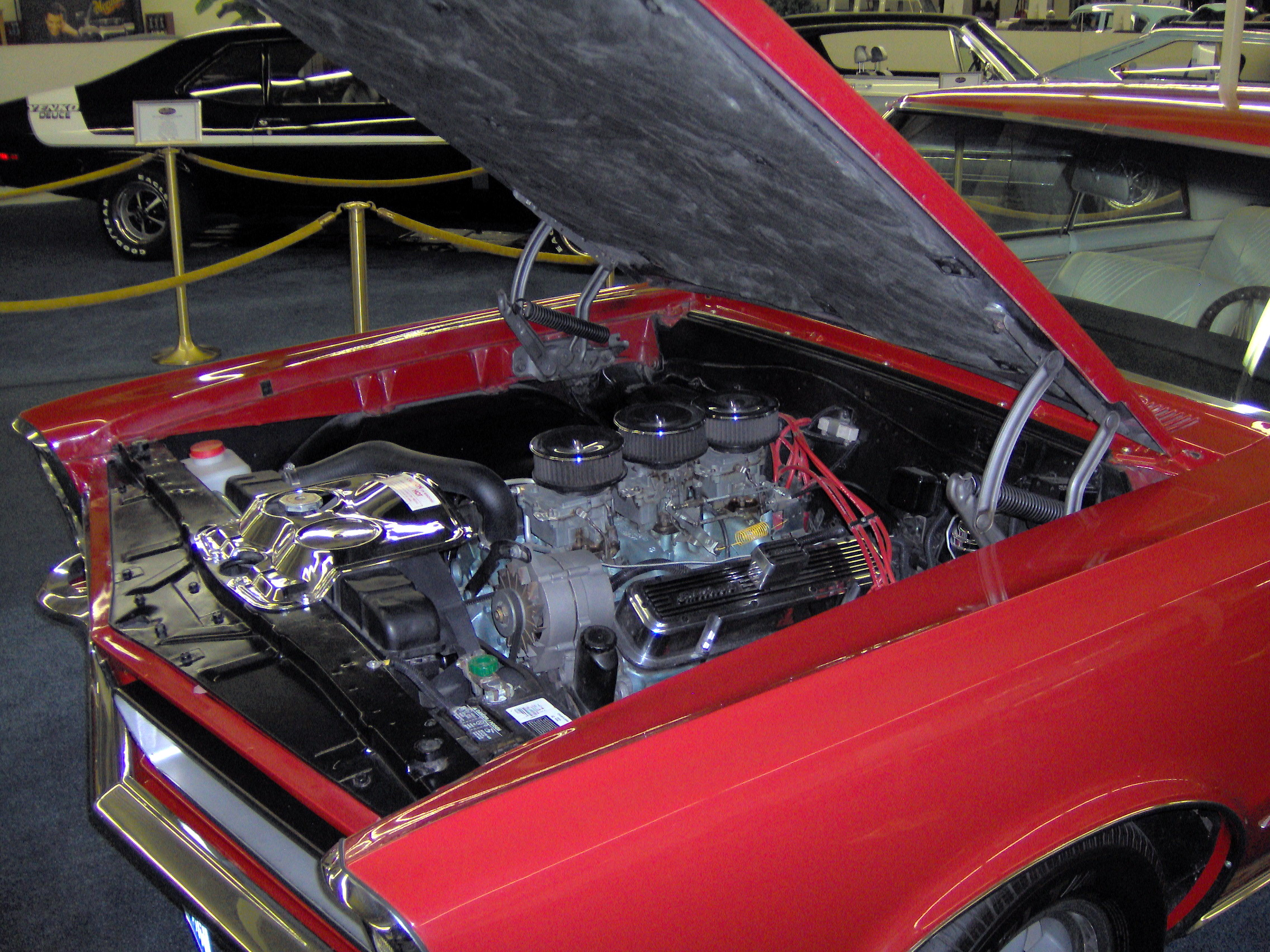 1965 Pontiac GTO Tri-Power